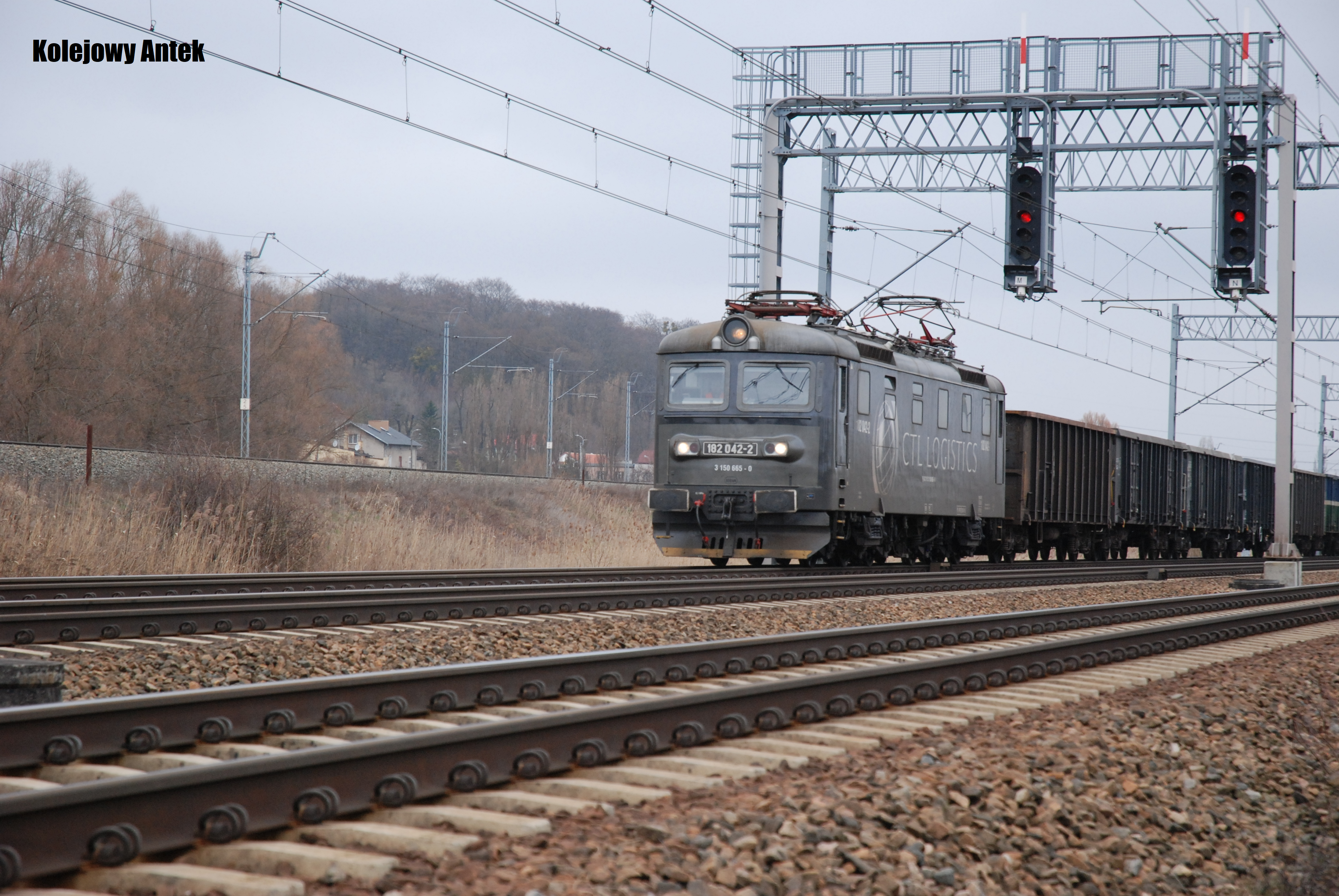 Fot. Kolejowy Antek